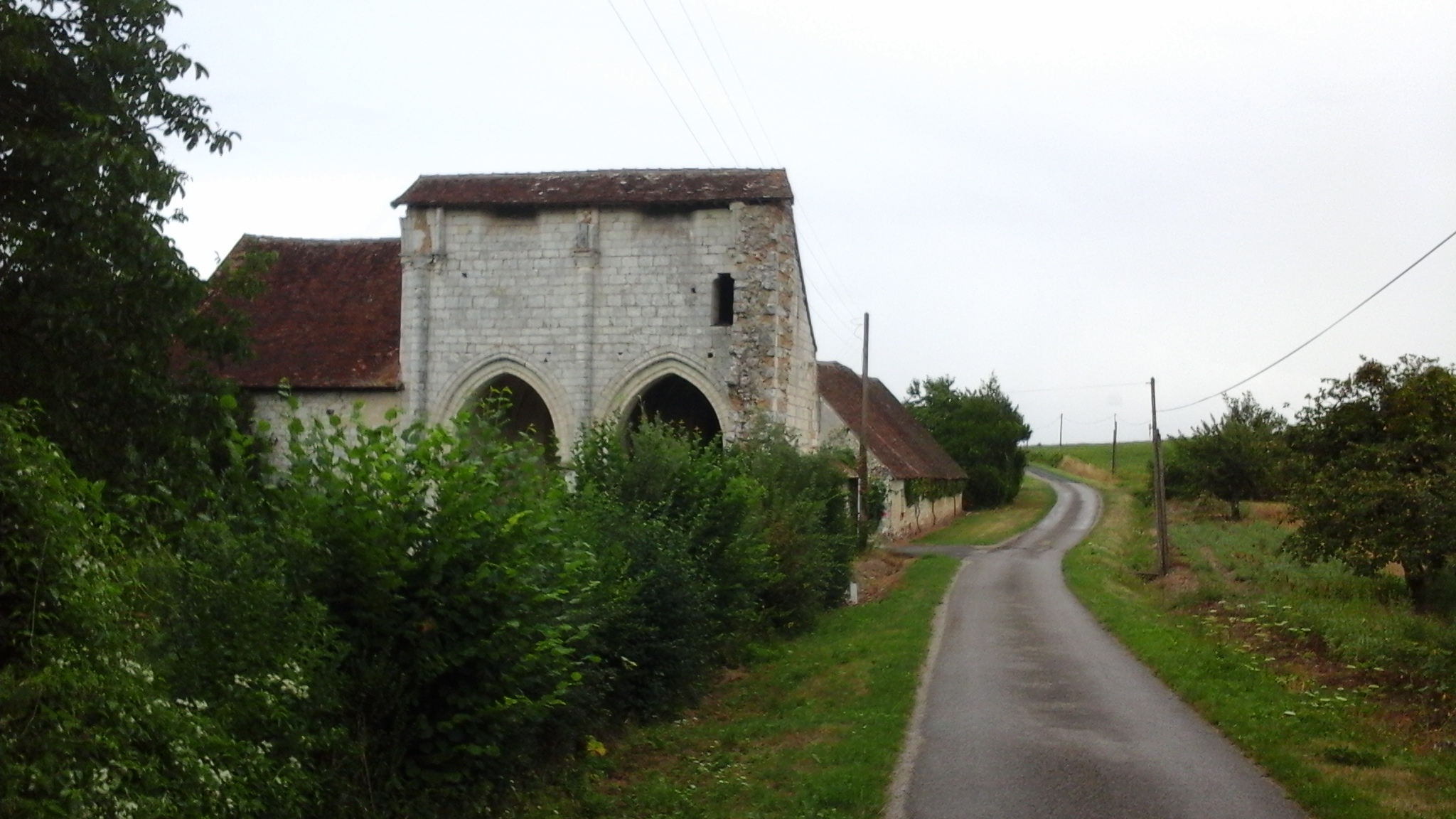 L'Abbaye Notre-Dame du Landais vue depuis la route, fondée en 1115